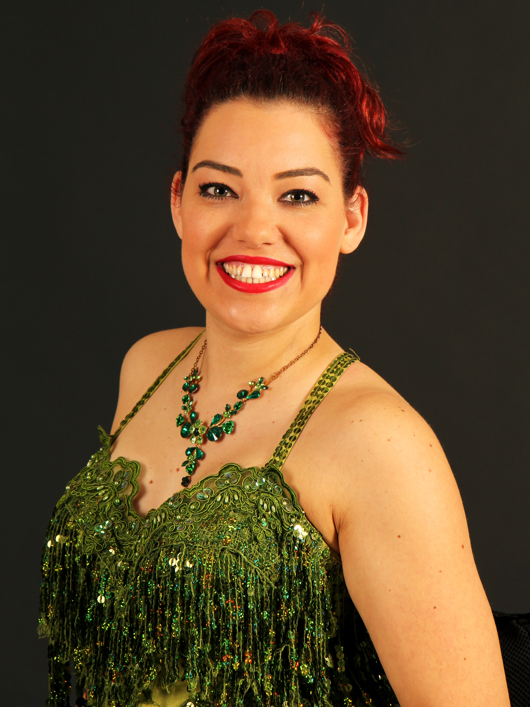 רקדנית לטינית בשמלה ירוקה, מחייכת. על רקע שחור.